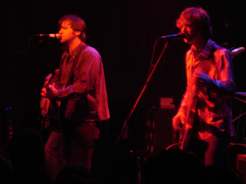 Son Volt (band)